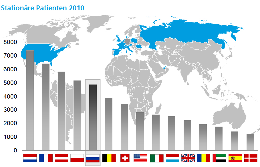 Grafische Darstellung der Herkunftsländer stationärer, ausländischer Medizintourismus-Patienten in Deutschland in 2010